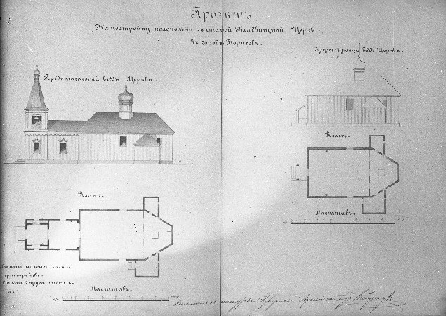 Беларуская (тарашкевіца): Барысаў (Barysaŭ), завулак Газэтны (zavułak Gazetny). Царква Сьвятога Андрэя. Праект прыбудовы званіцы